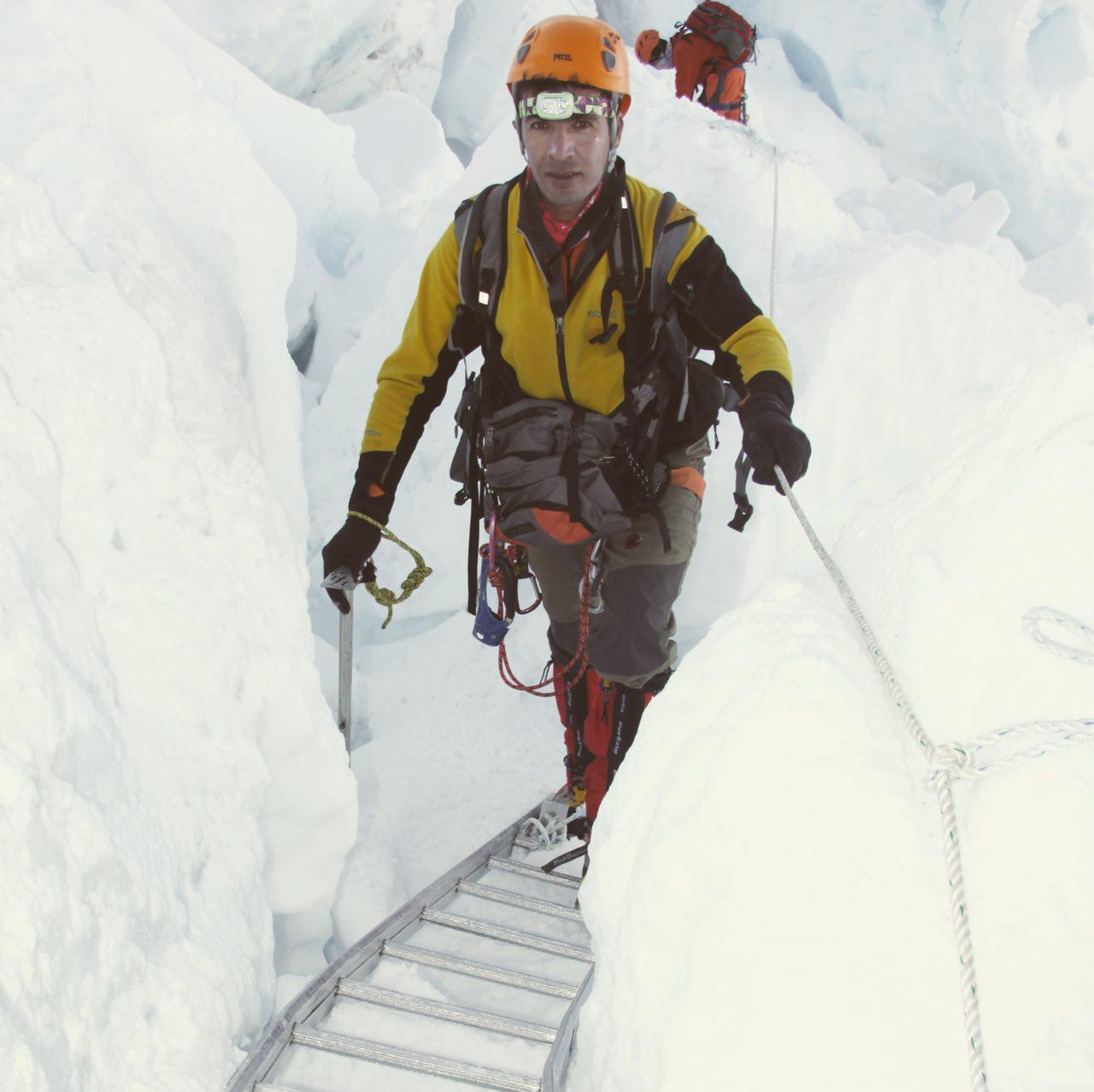 جواد نوروزی در مسیر اورست